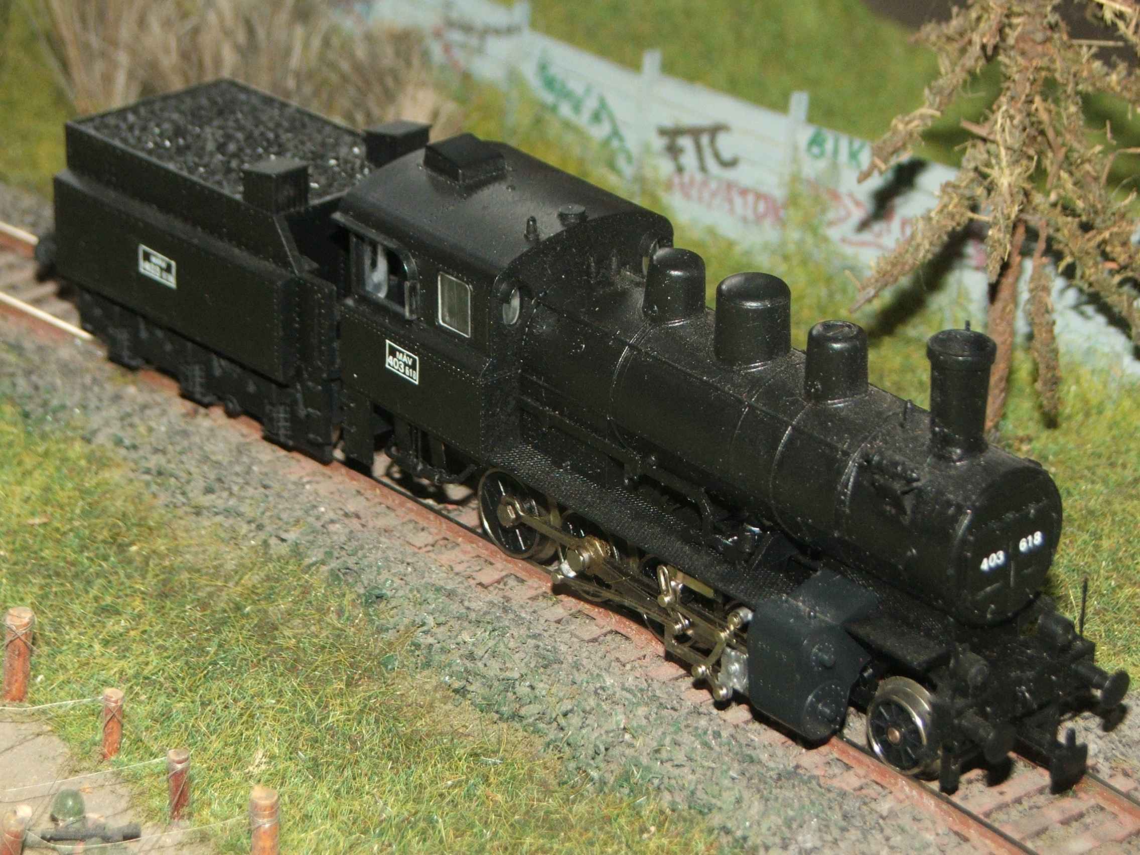 403 típusú MÁV gőzmodony modellje a veszprémi vasútmodell klub modulján.